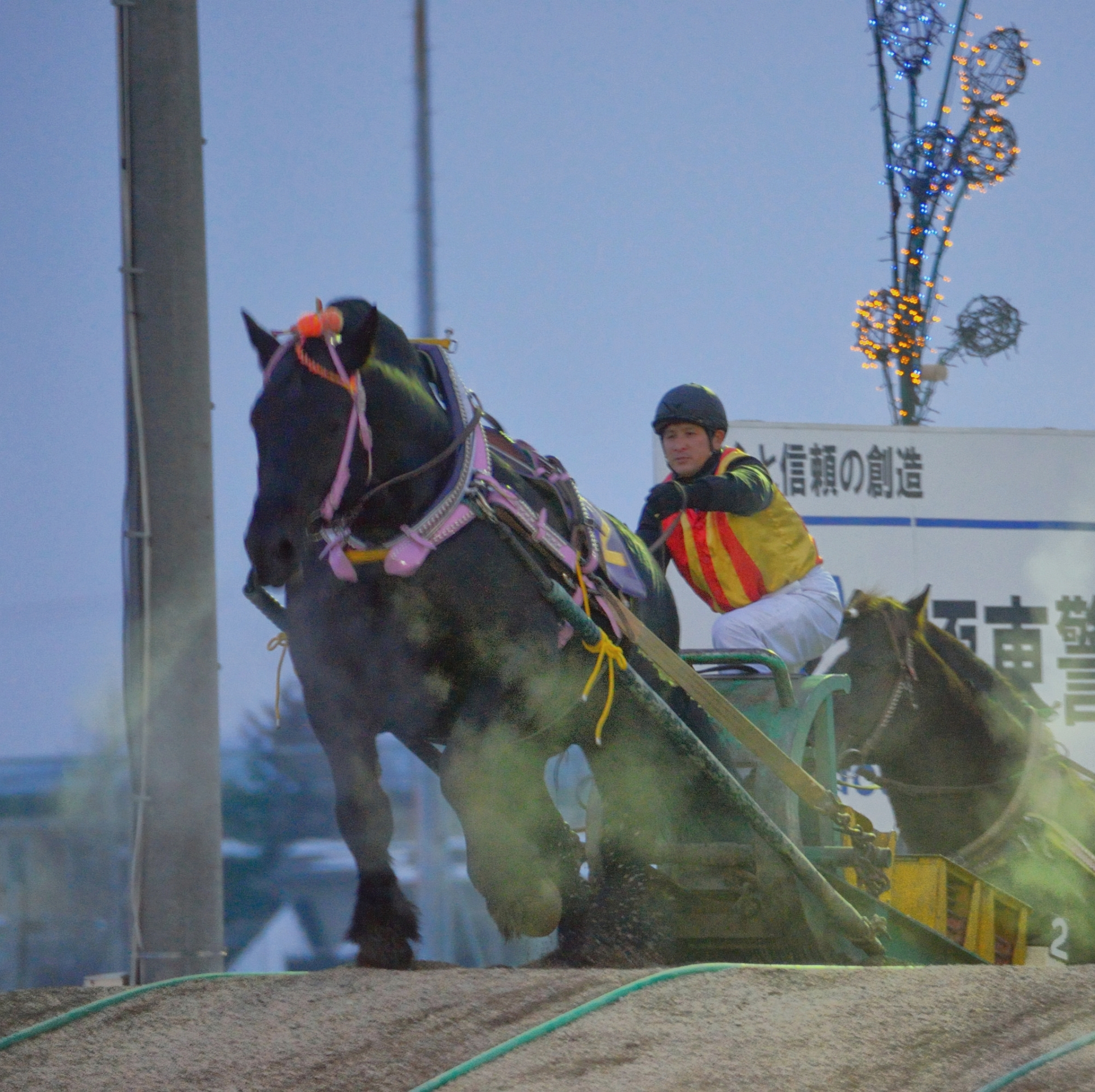 カネサブラック 2013年1月2日帯広記念 優勝馬 帯広競馬場第2障害にて 投稿者が撮影